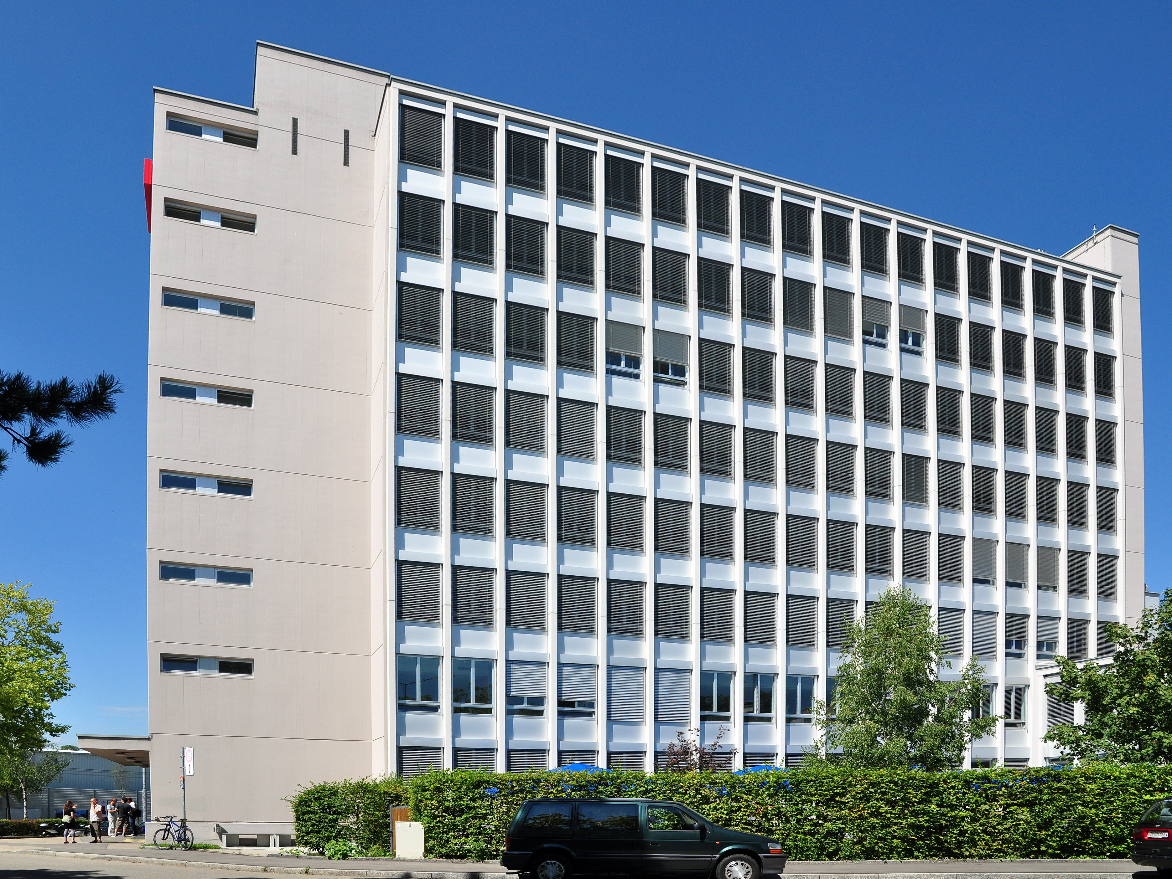 Schweizer Radio DRS in Zürich-Oerlikon (Switzerland)